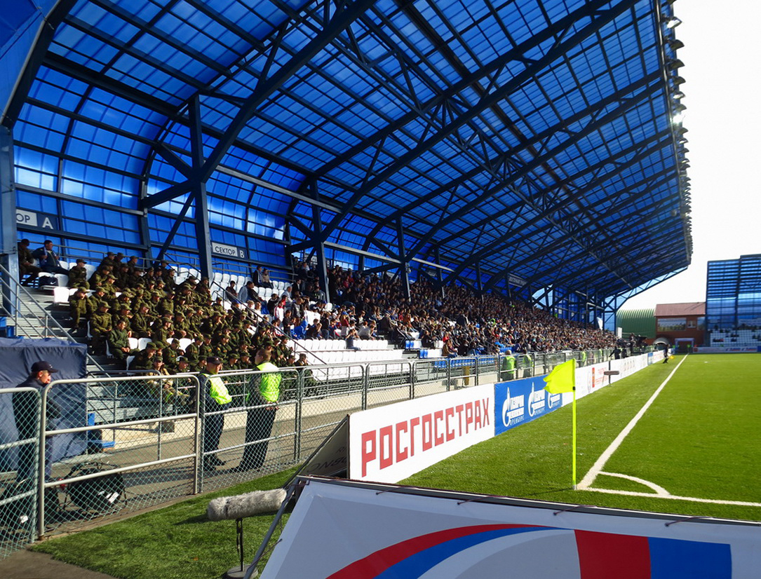 Восточная трибуна стадиона "Газовик" в Оренбурге, 25 сентября 2016г (матч "Оренбург" - "Урал")